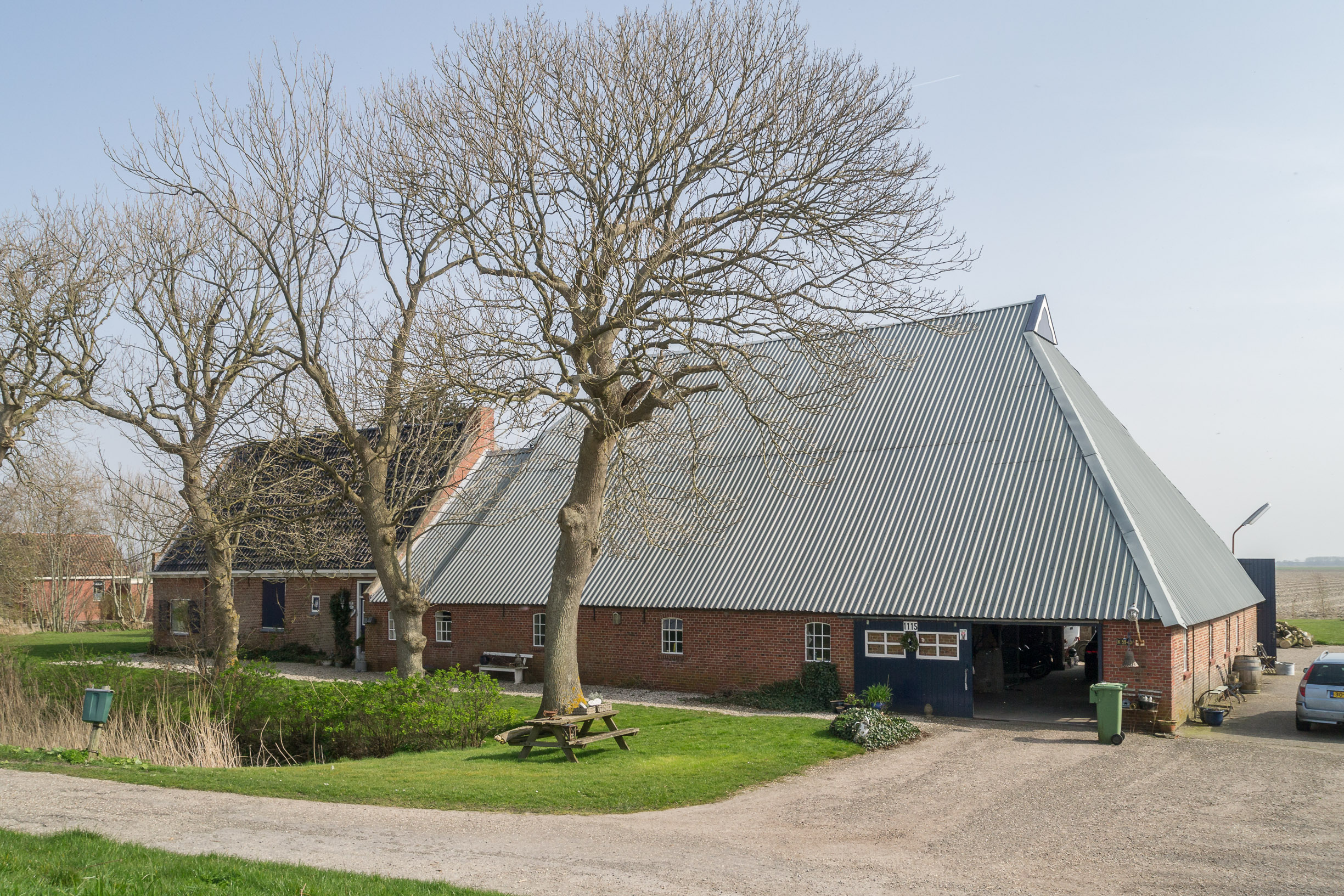 Oudebildtdijk 1115, Sint Annaparochie